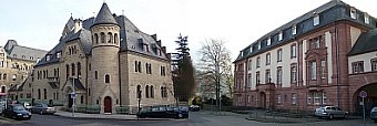 Die beiden Dienstgebäude des OLG Koblenz